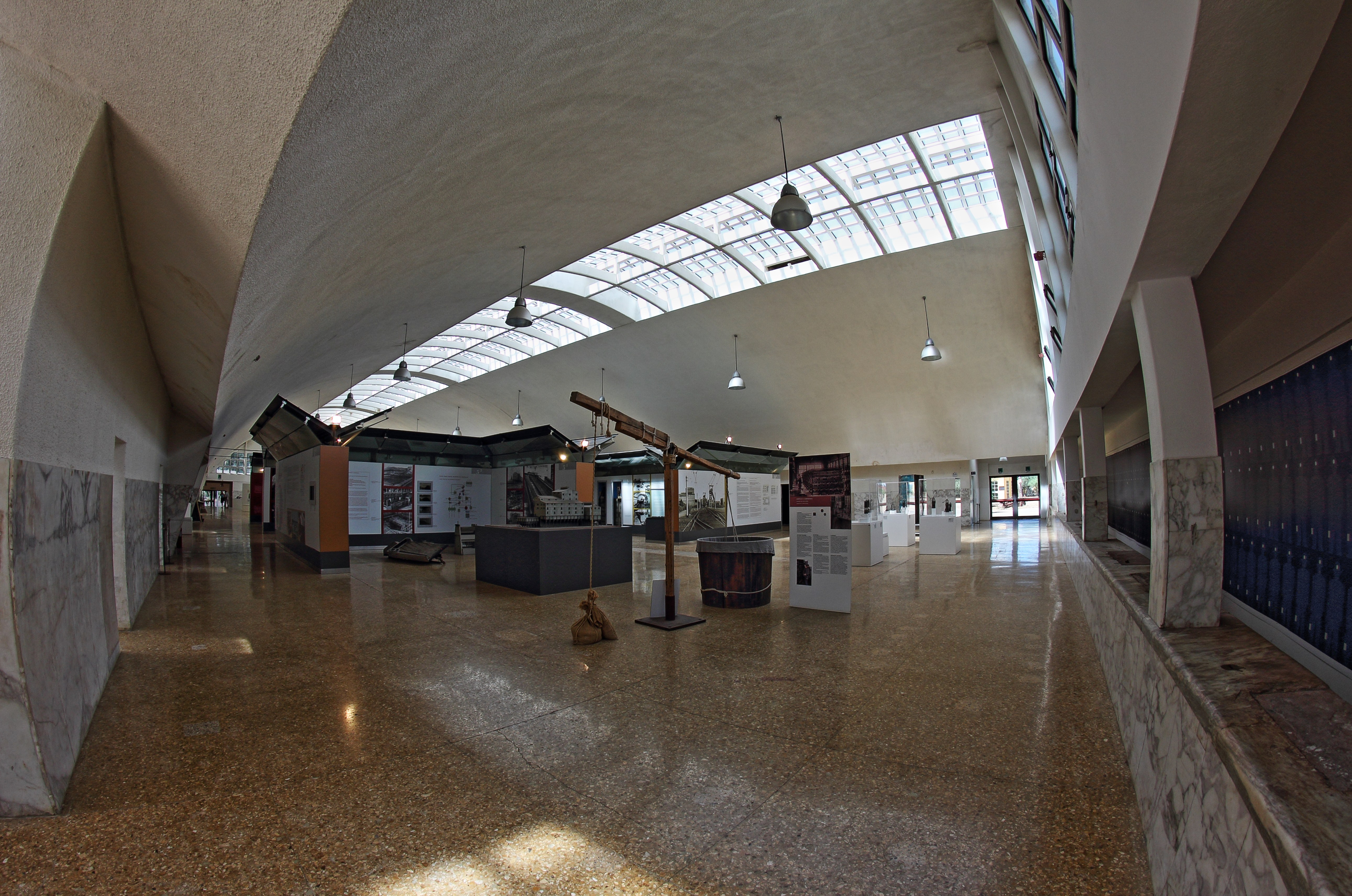 Museo del Carbone Lampisteria - oggi usata come sala espositiva del Museo. This is a photo of a monument which is part of cultural heritage of Italy.